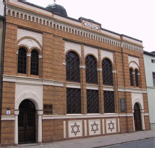 SCHALOM-Haus, Fassade